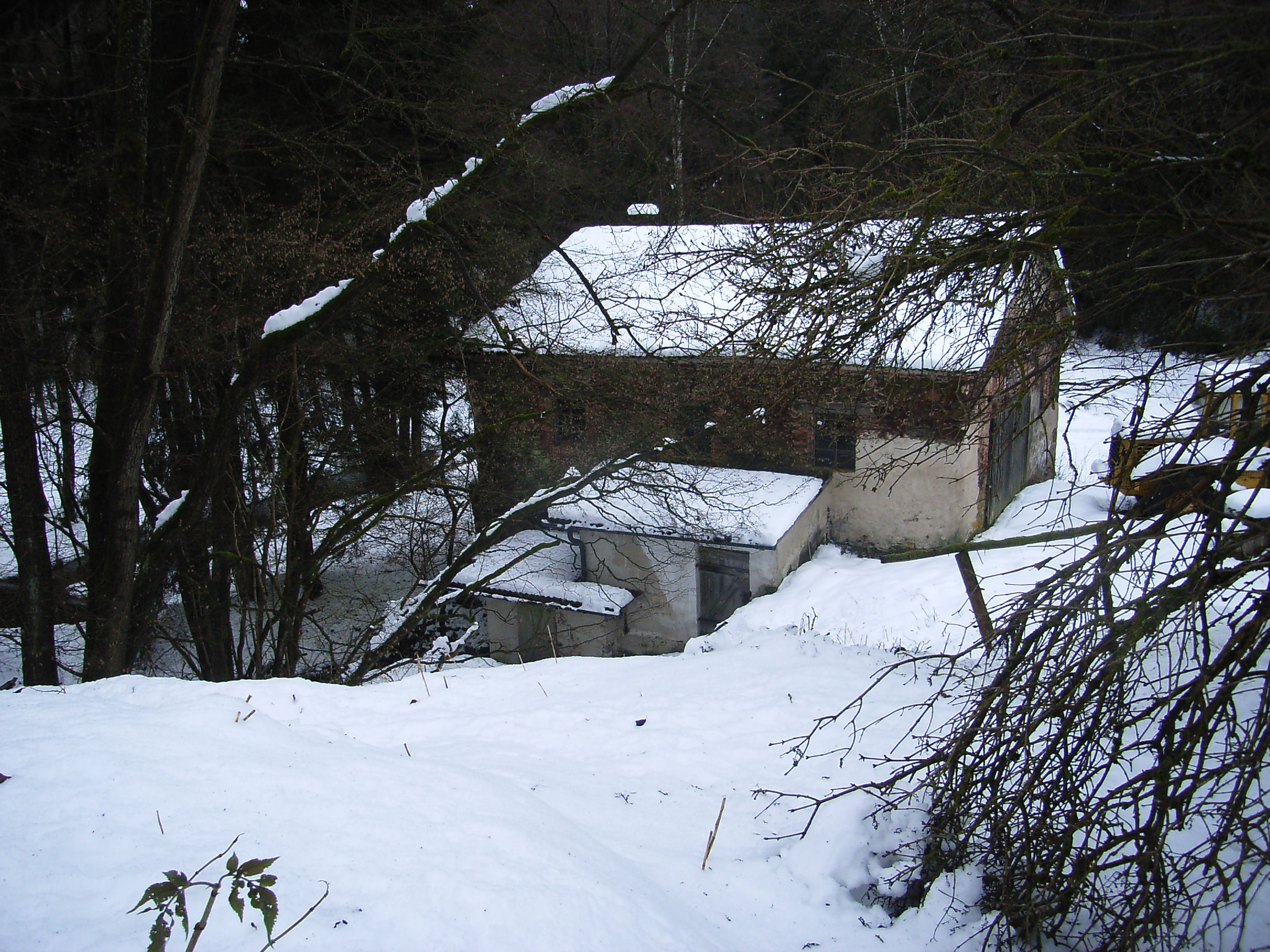 Hüttensäge im Winter (2012)